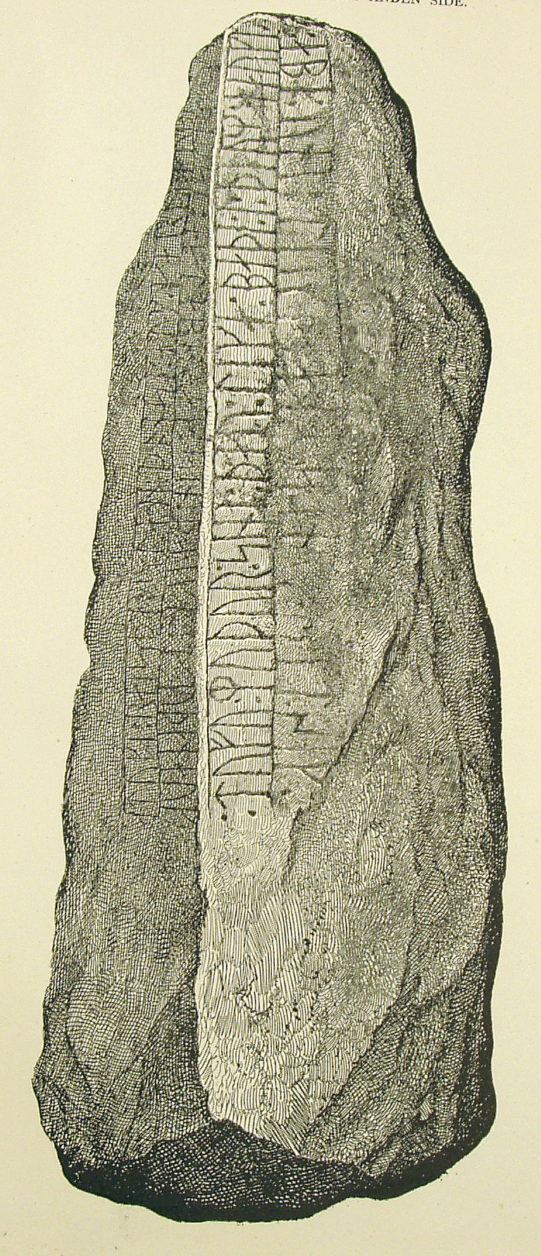 Gunderup-stenen 1 er en runesten, fundet i Gunderup i 1629. Den anden side